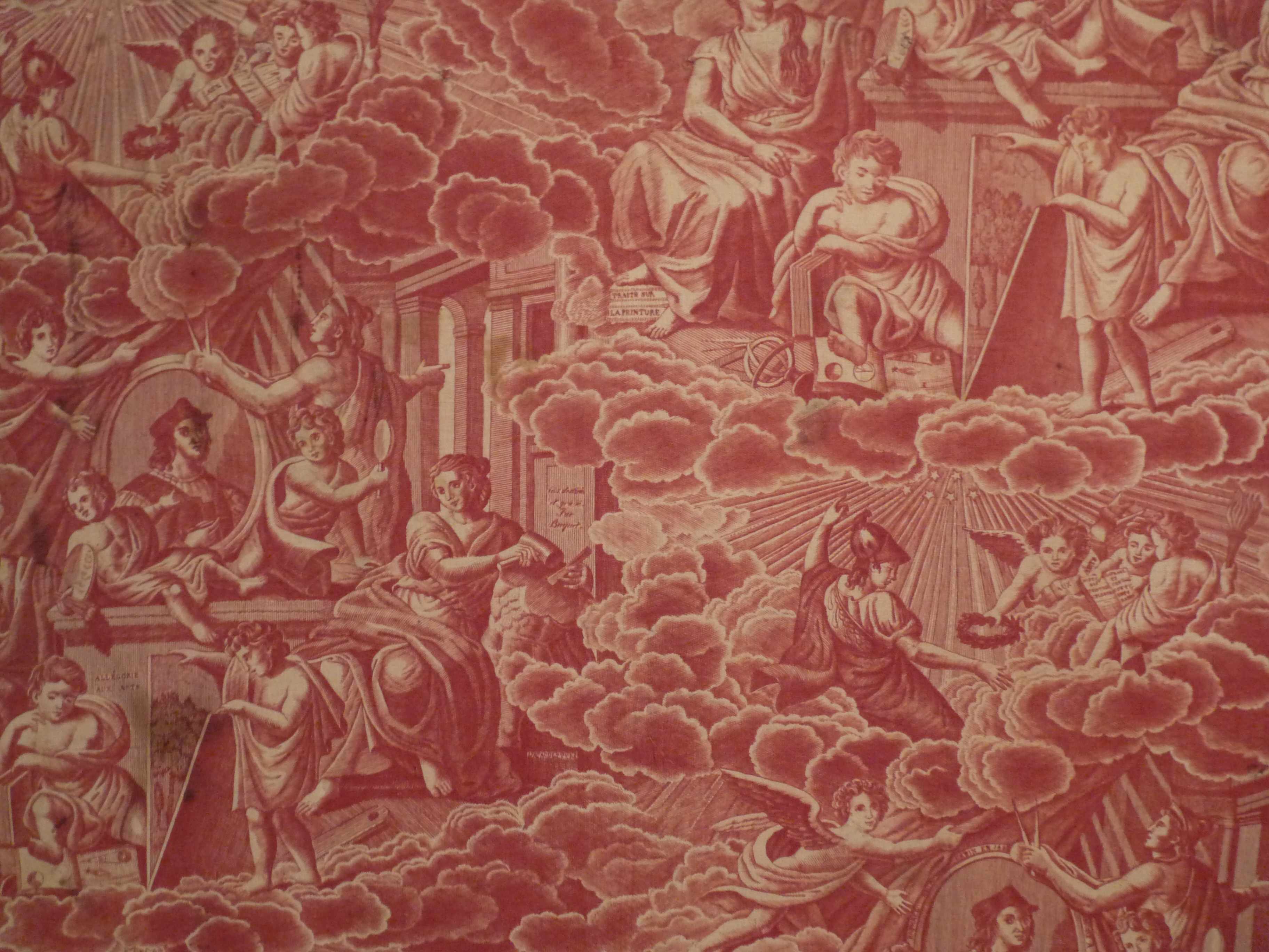 Les Arts, toile de coton imprimée à la plaque de cuivre ; Rouen, dessinateur et graveur Narcisse-Alexandre Buquet, vers 1855 (Musée de l'impression sur étoffes de Mulhouse)